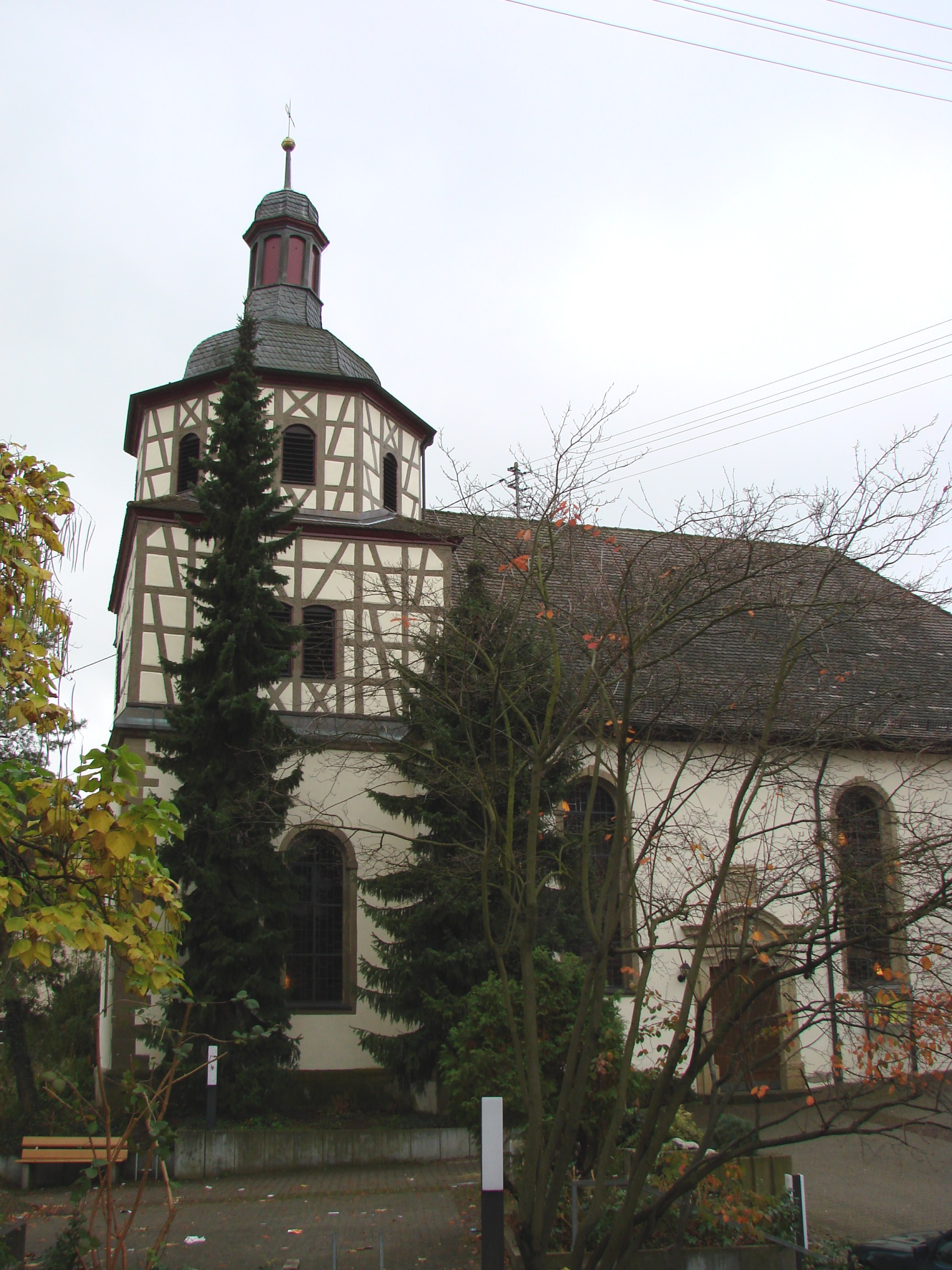 Oberstenfeld, Fleckenkirche (village church) of 1738